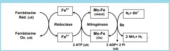 La figure montre la voie de la fixation biologique de l'azote chez les plantes.